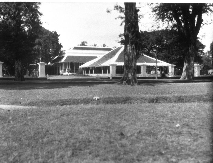 Foto. De regentenwoning te Sitoebondo op Oost-Java